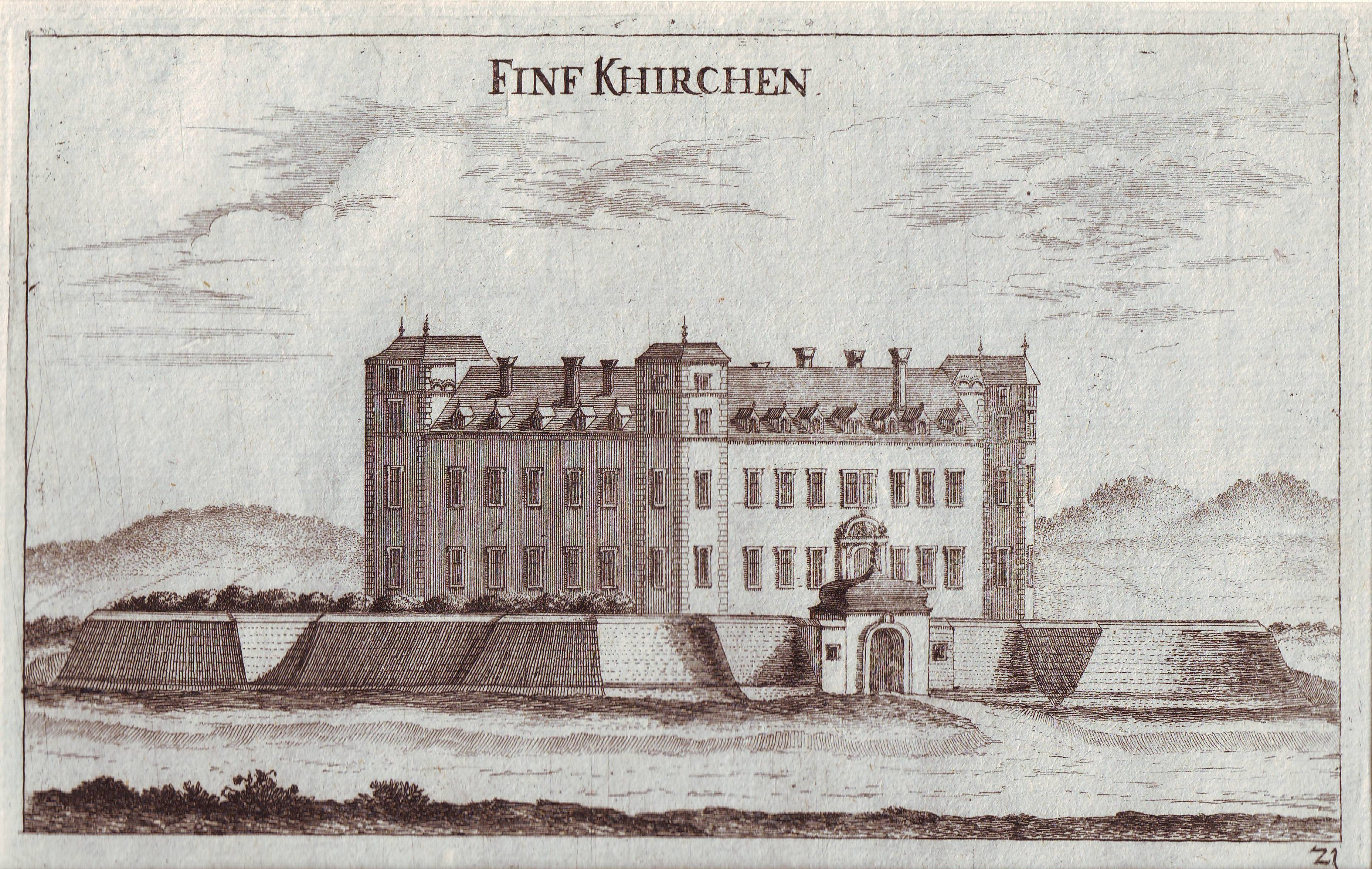 Vischer-Stich des Schloss Baumgarten um 1672